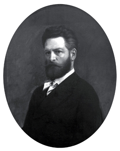 Тимофей Жегин